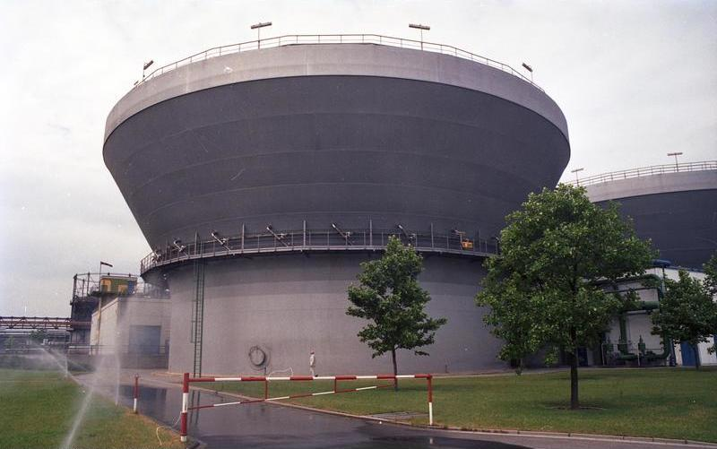 Juni 1988 Frankfurt-Hoechst AG (Chemiewerk): Wasserkläranlage